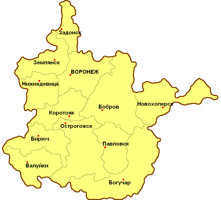 Административное деление Воронежской губернии